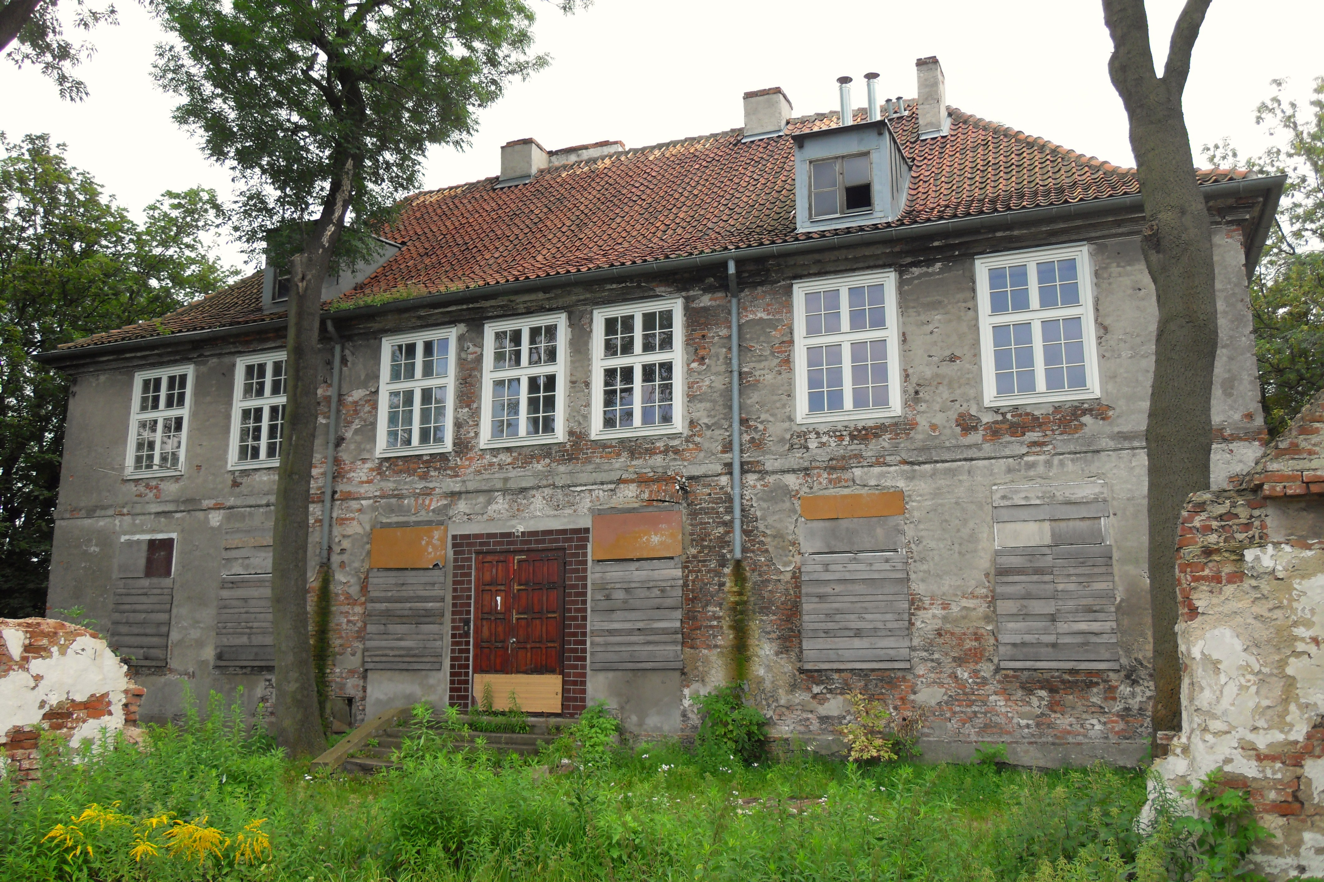 Gdańsk Olszynka. Dwór, ul. Olszyńska 37.